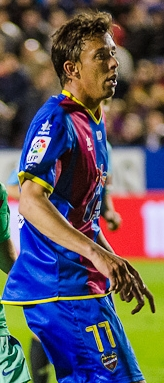 El jugador granota Pedro Botelho